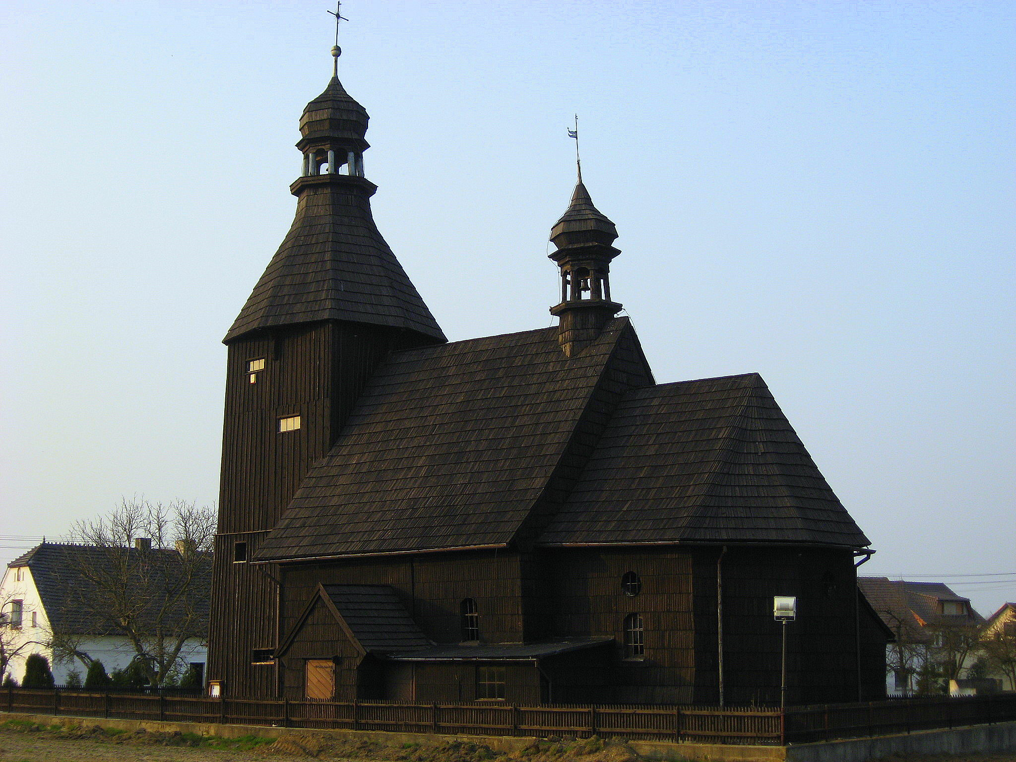 Holzkirche in Szczepanek Stephanshain (Oberschlesien)